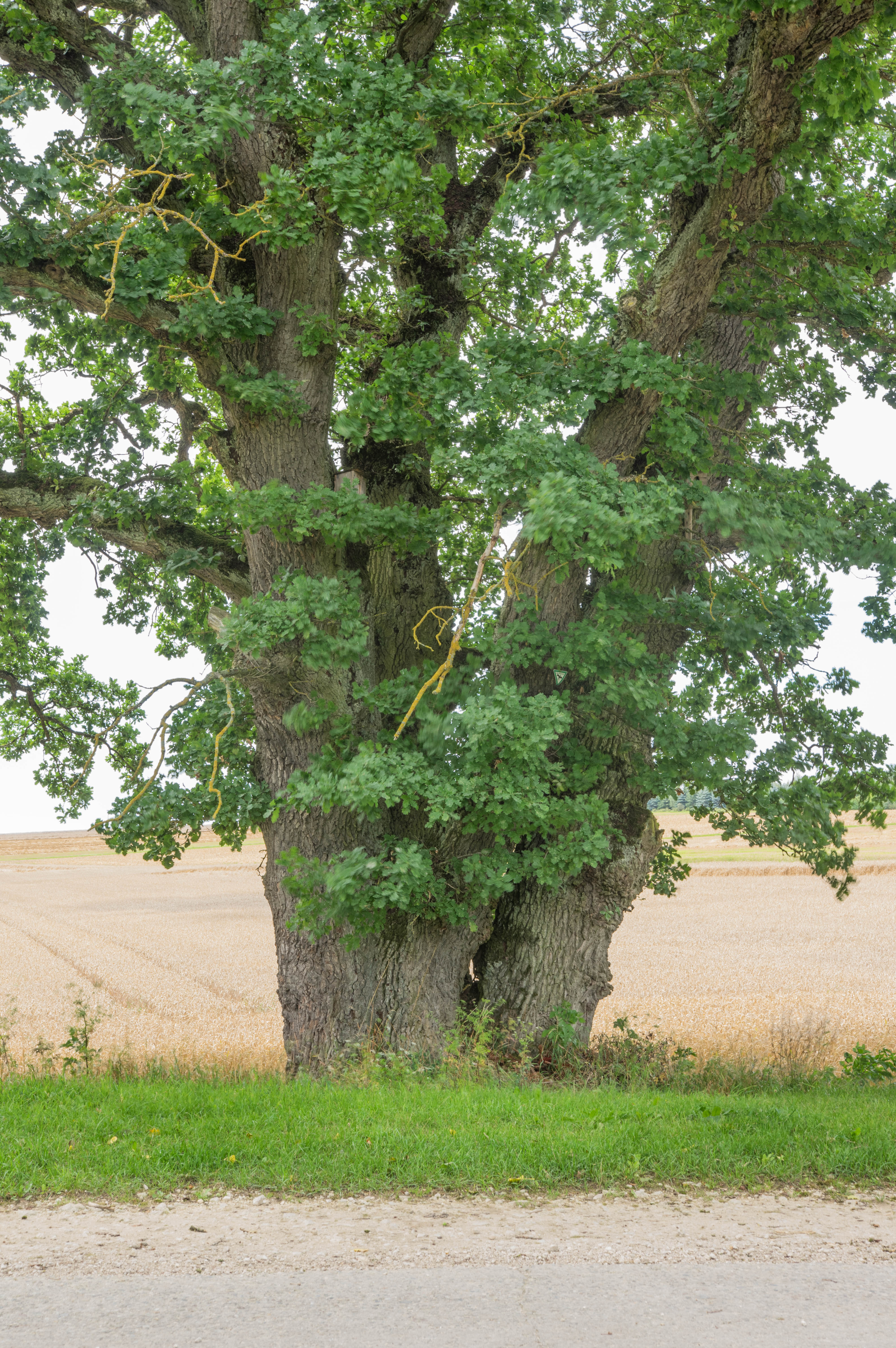 Detail Stamm, Naturdenkmal ND-06554